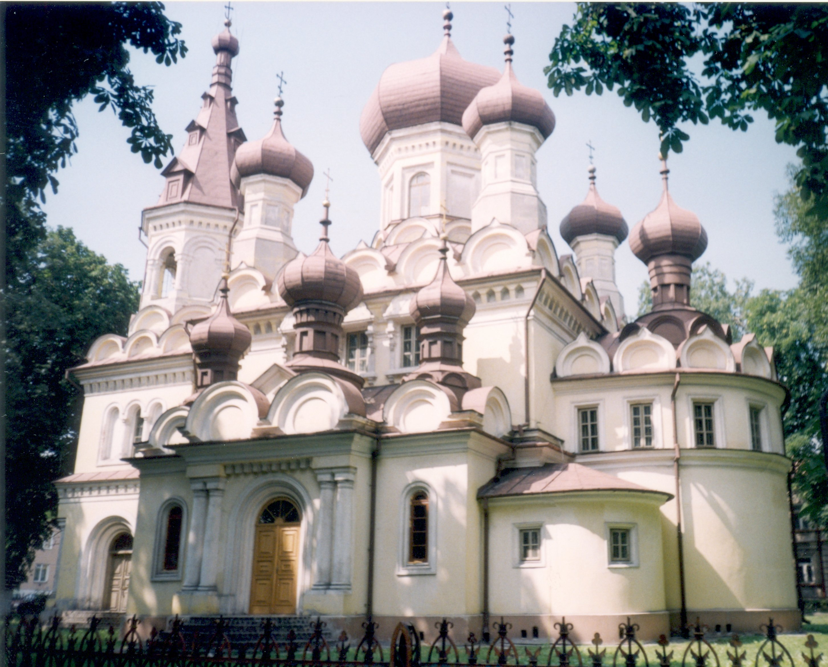 Cerkiew w Hrubieszowie z 1873 r.